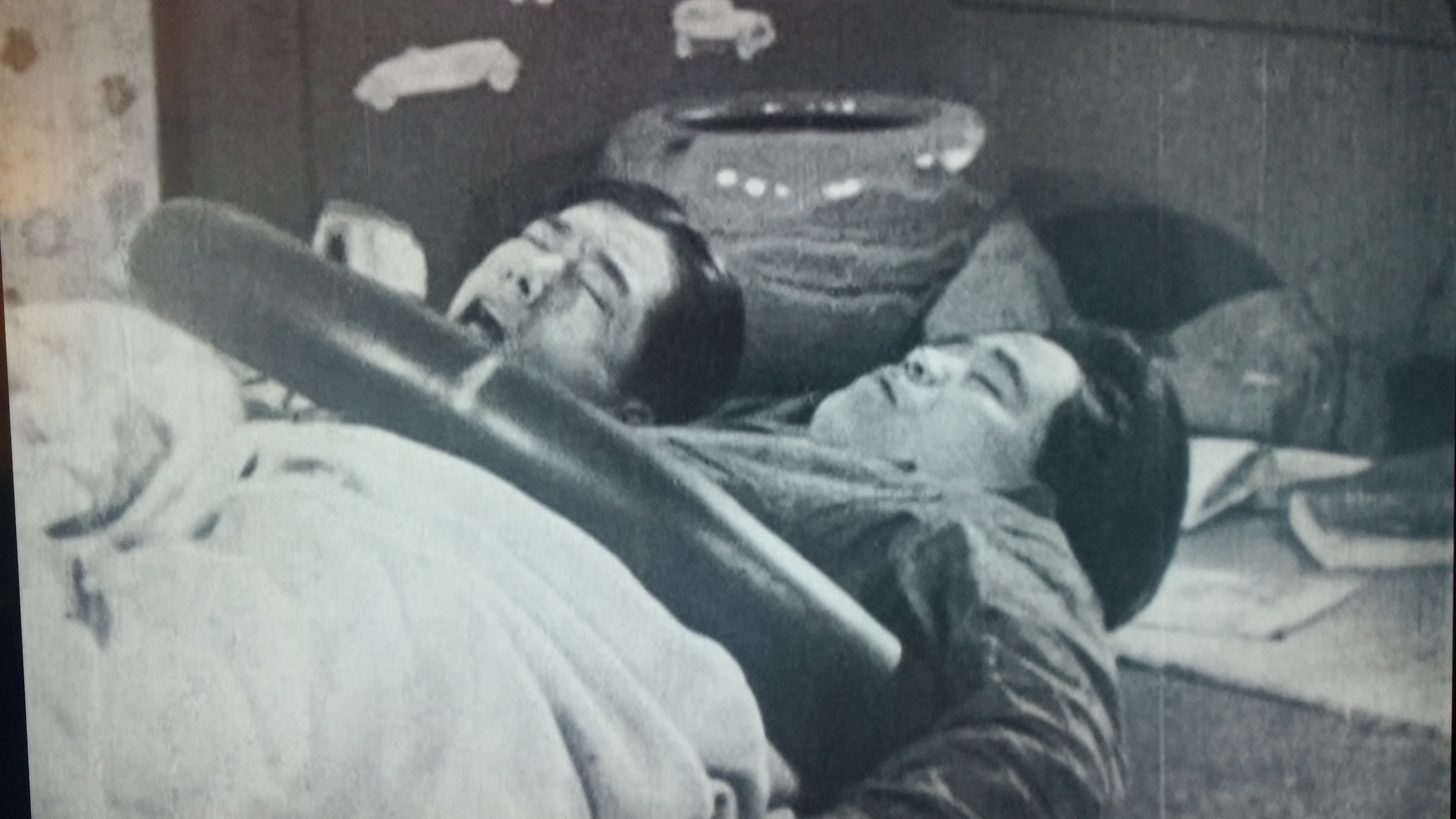 Fotograma de Unidos en la pelea (1929) Tíitulo original: Wasei Kenka Tomodachi, de Yasujiro Ozu